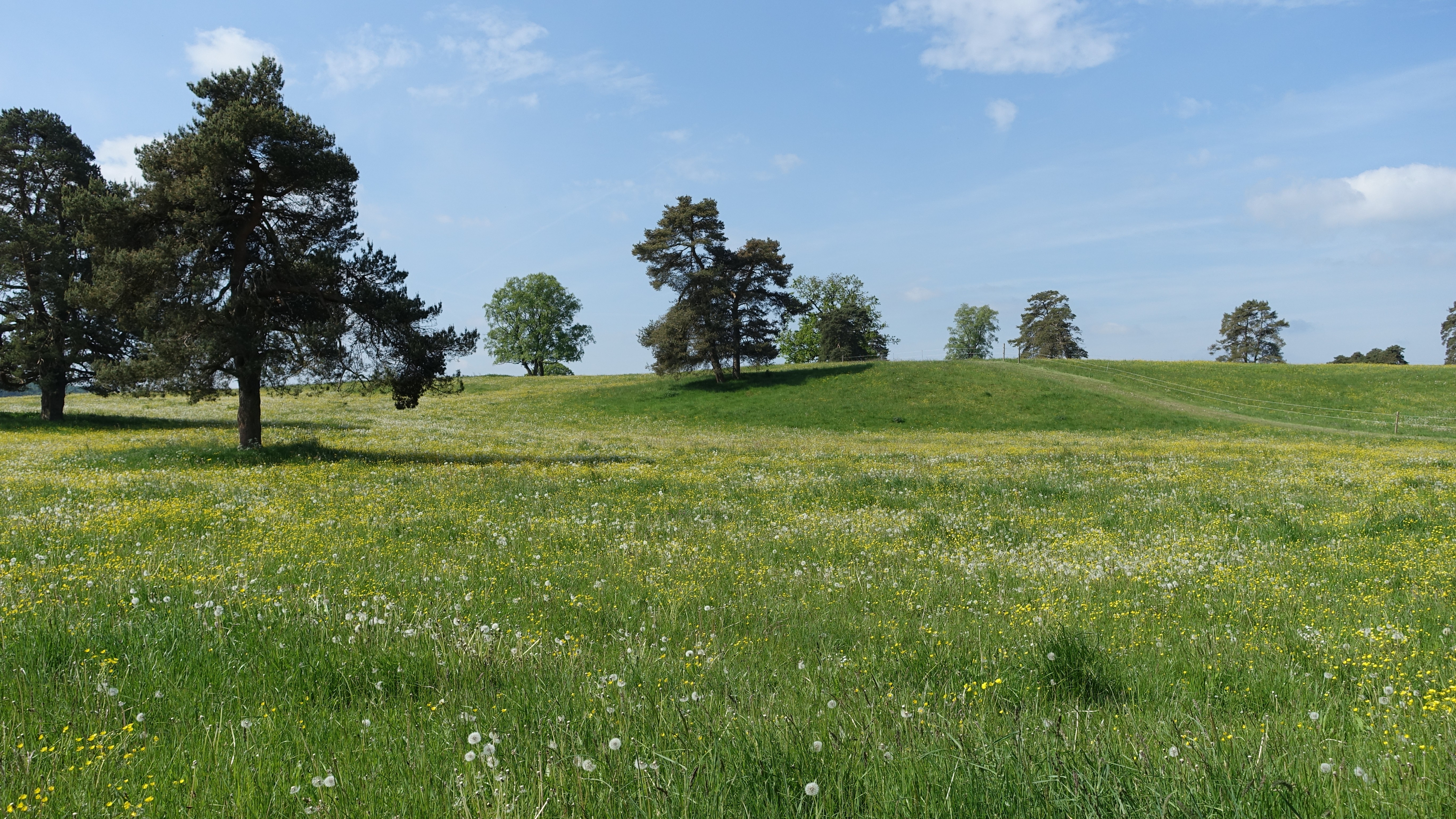 Engstingen - Albhochfläche Haid03